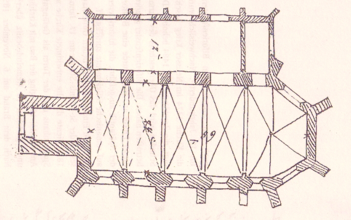 Alt St. Pankratius (Köln-Worringen), Grundriss-Skizze, 1860